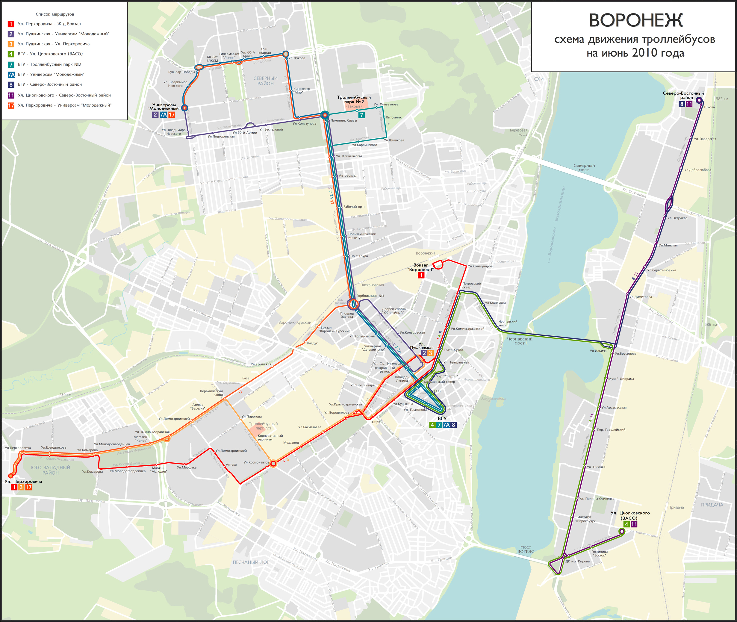 Воронежский троллейбус - схема движения 2010 год, июнь